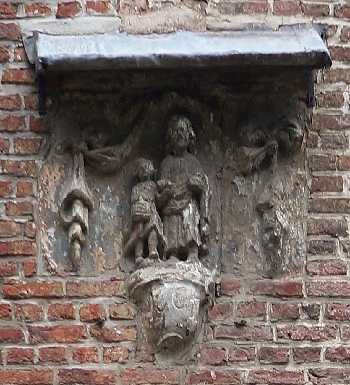 Pierre sculptée du XV° représentant Saint-Joseph et l'Enfant-Jésus au 6 rue Saint-Joseph (détail) Lille Nord (département français)